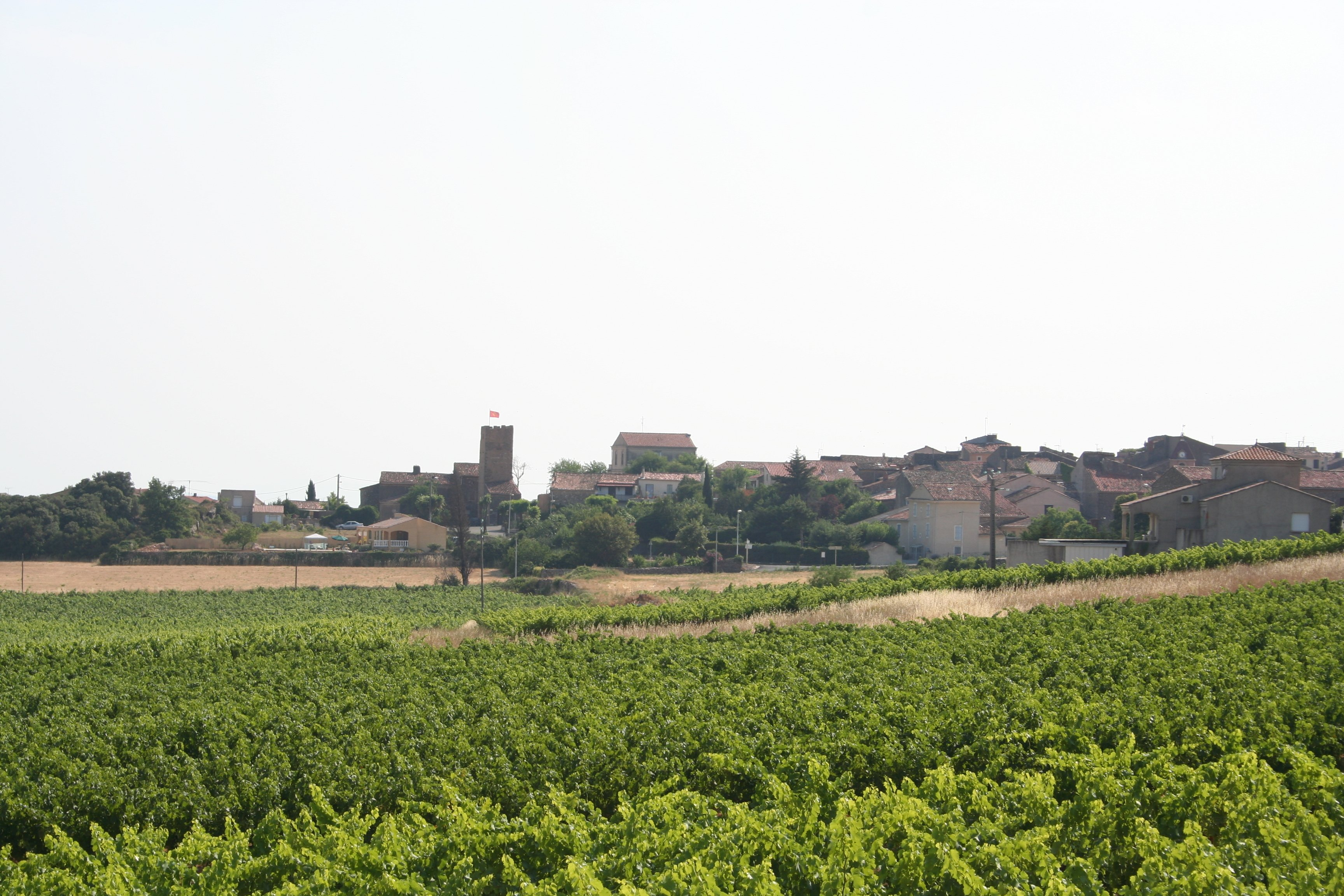 Vue d'ensemble de Assignan, Hérault, France.